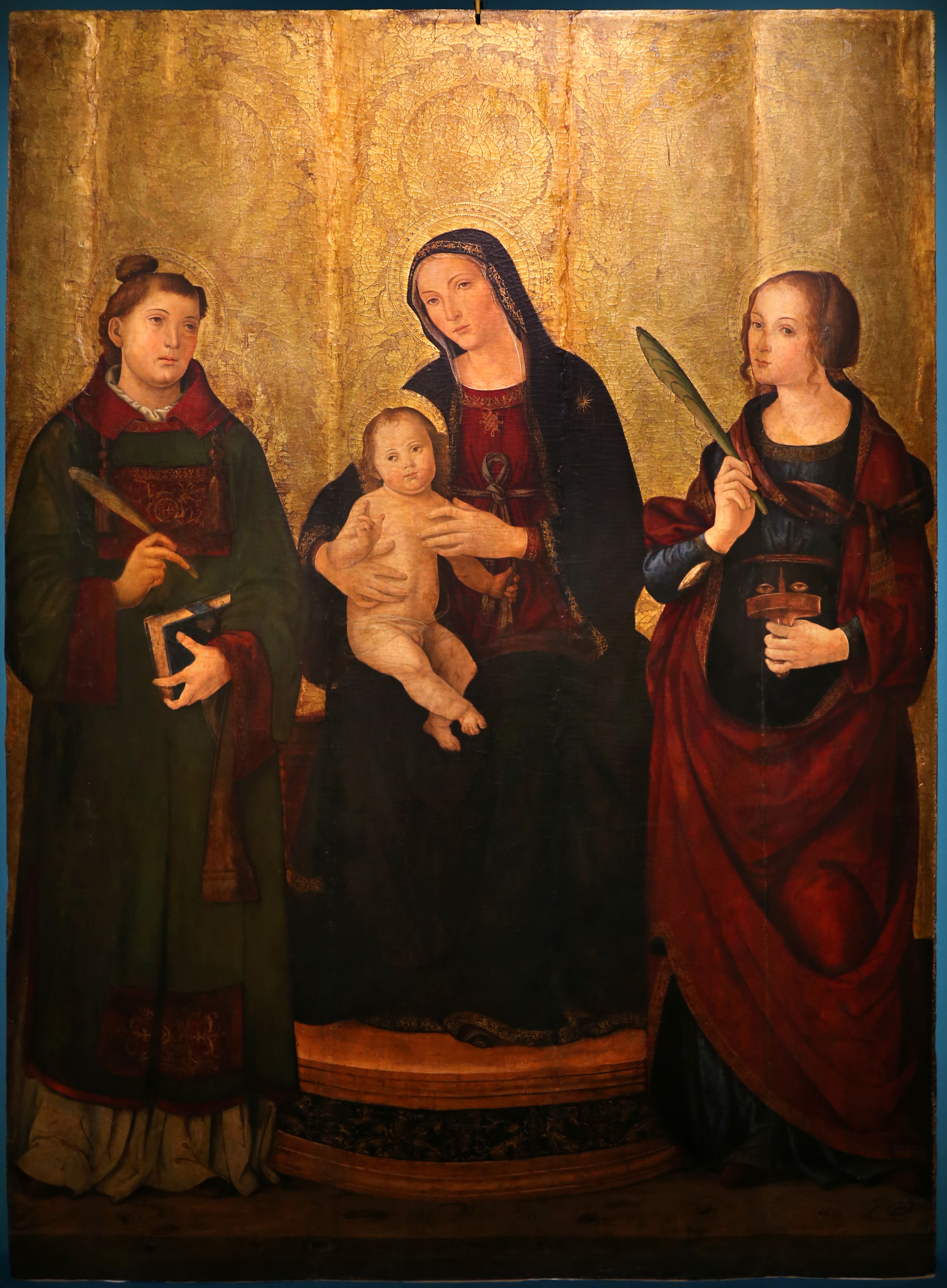 Palazzo Lanfranchi This is a photo of a monument which is part of cultural heritage of Italy.